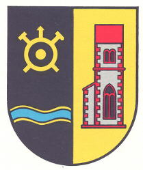 Wappen von Bosenbach